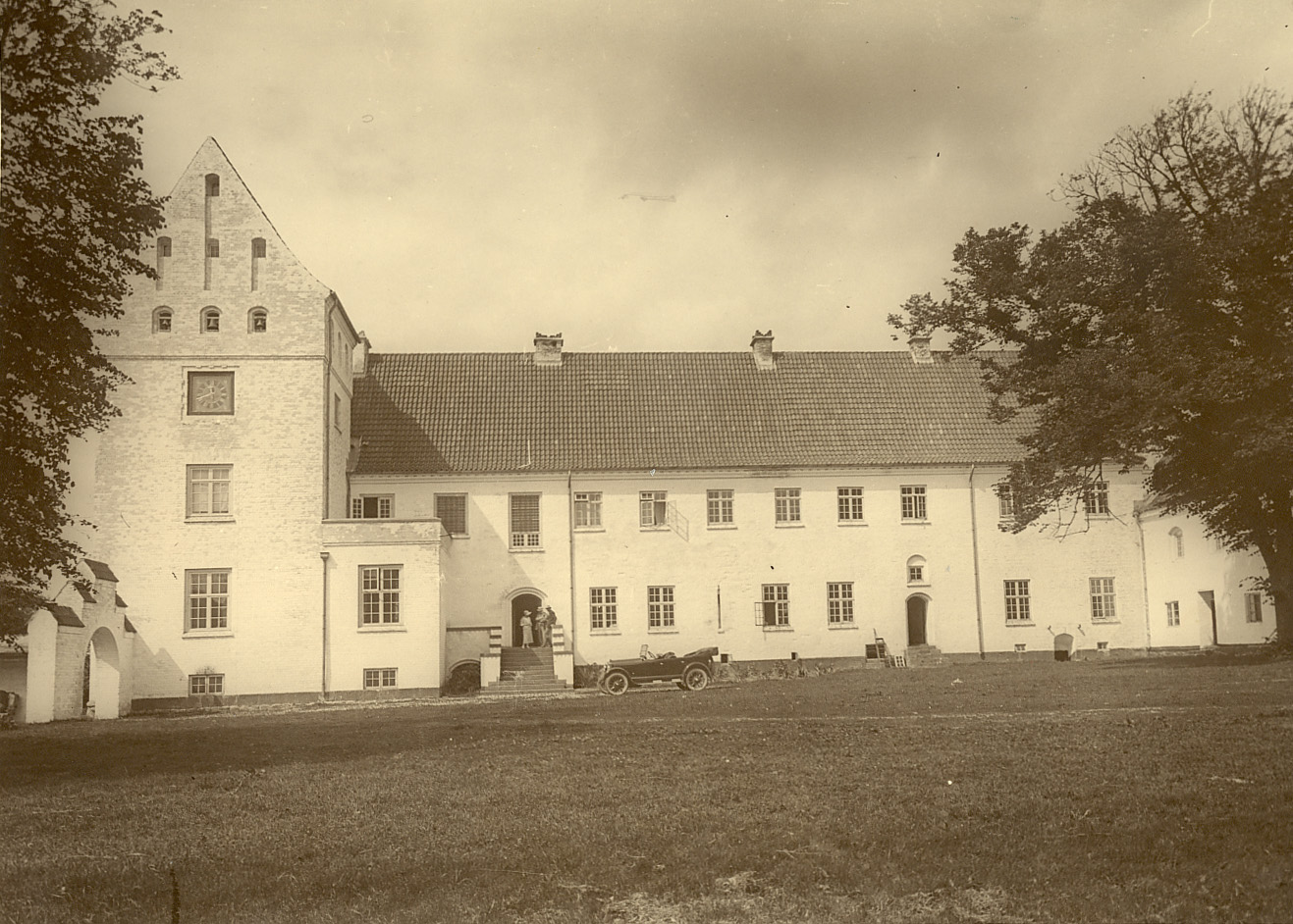 Vrejlev Kloster set fra gårdspladsen